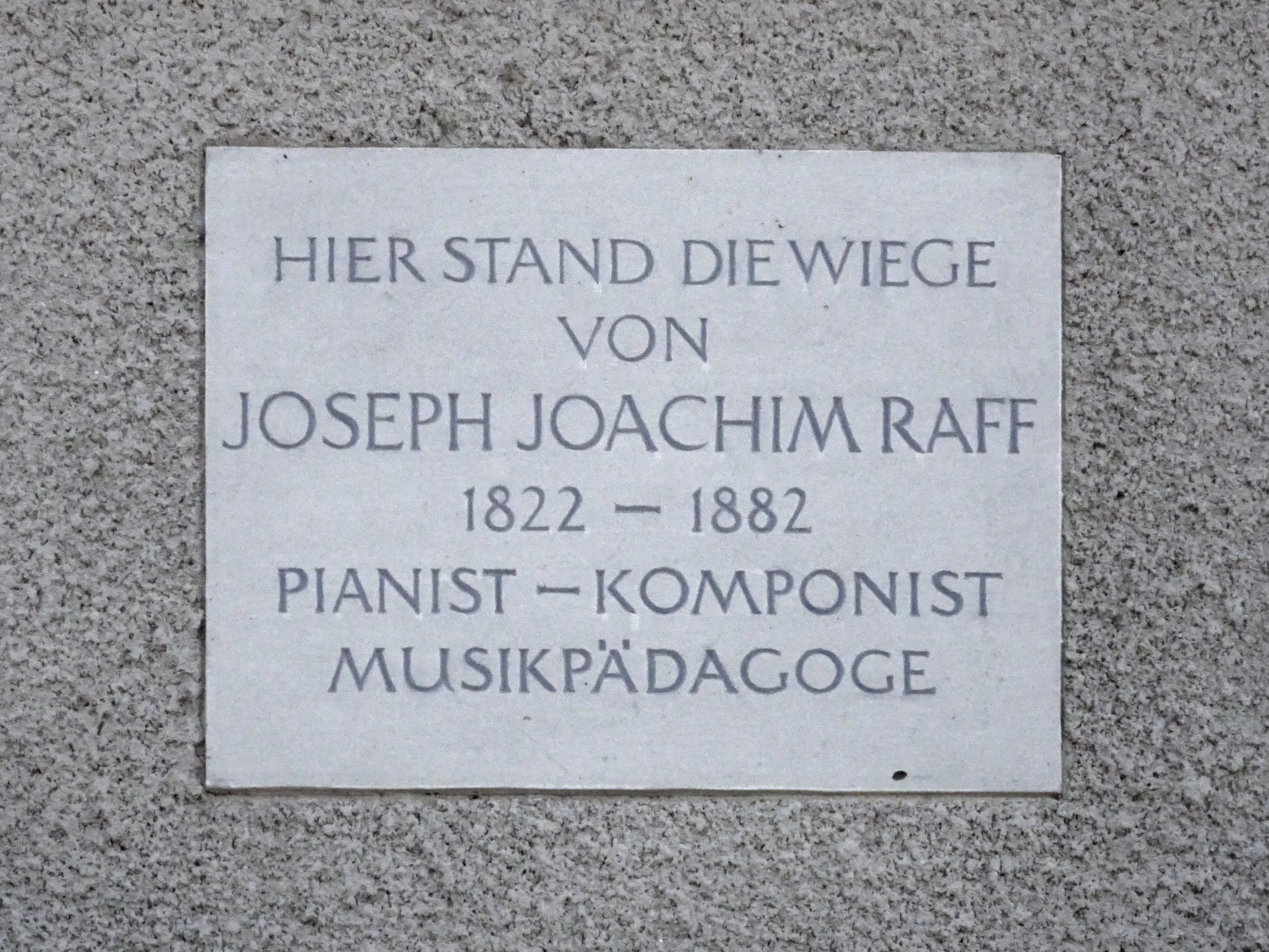 Gedenktafel Joseph Joachim Raff, Lachen SZ